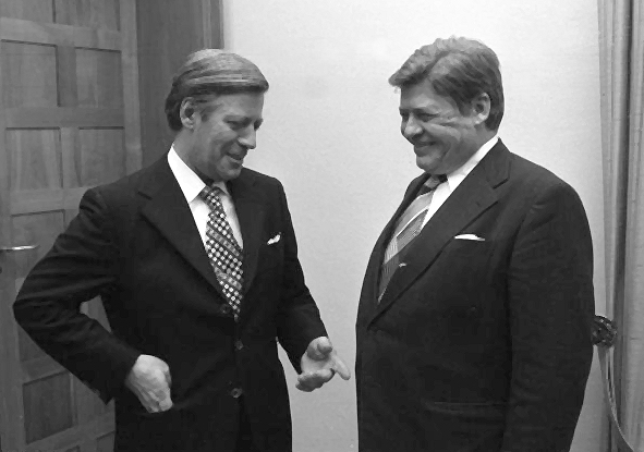 Bundeskanzler Helmut Schmidt empfängt Arbeitgeberpräsident Hanns Martin Schleyer